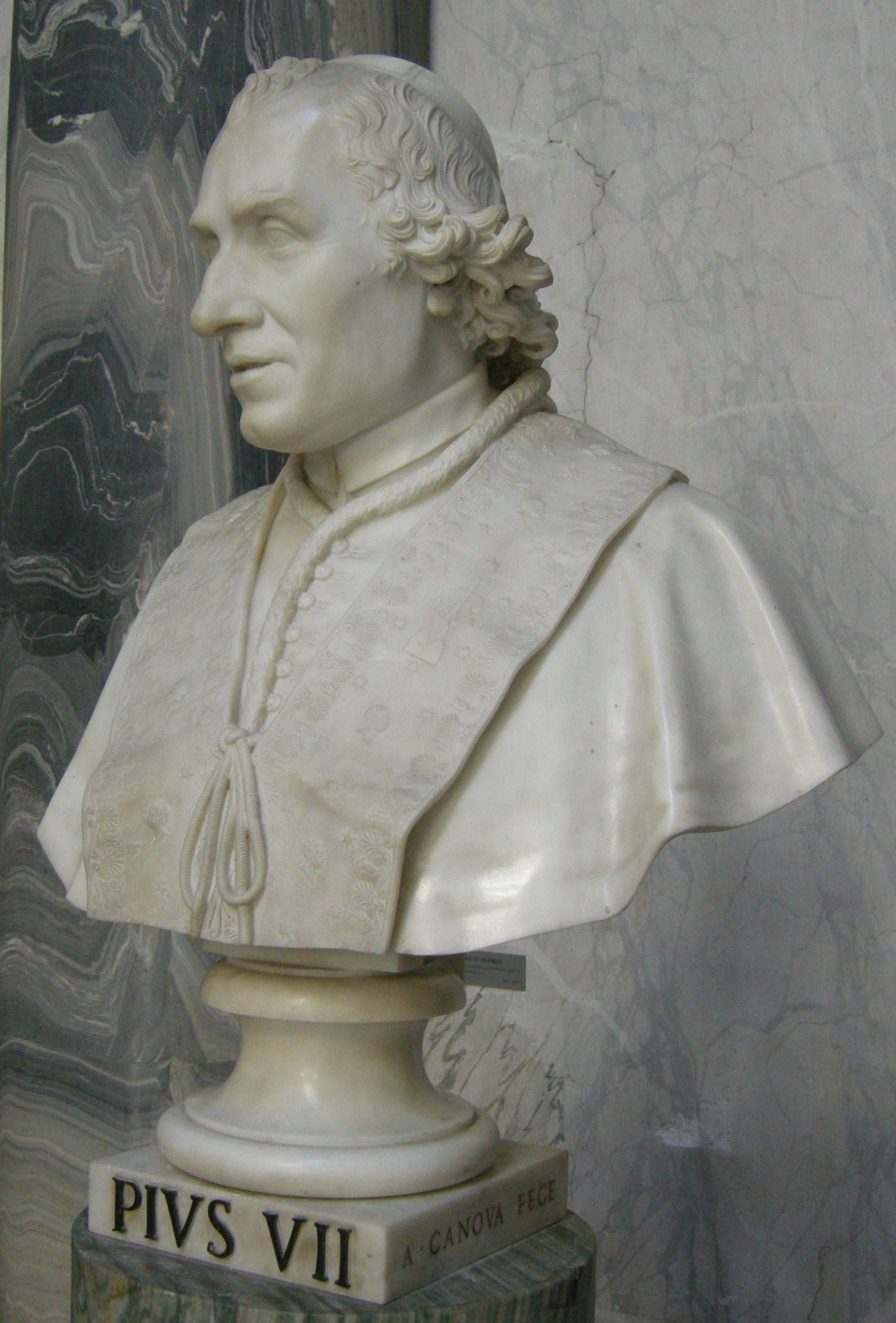 Antonio canova, ritratto di pio VII